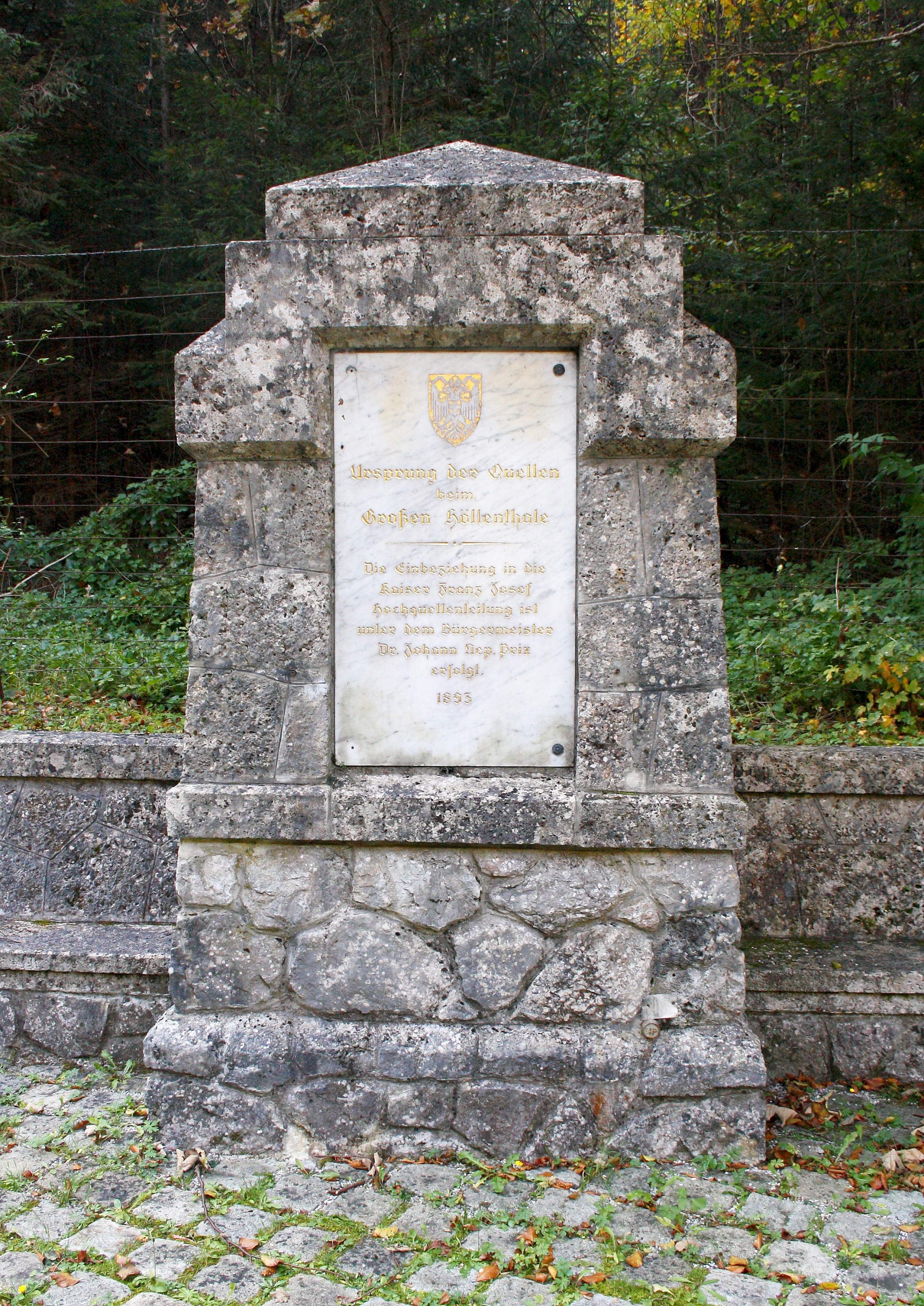 Denkmal für die Ursprungsquellen der Wiener Hochquellen-Wasserleitung beim Taleingang des Großen Höllentals.